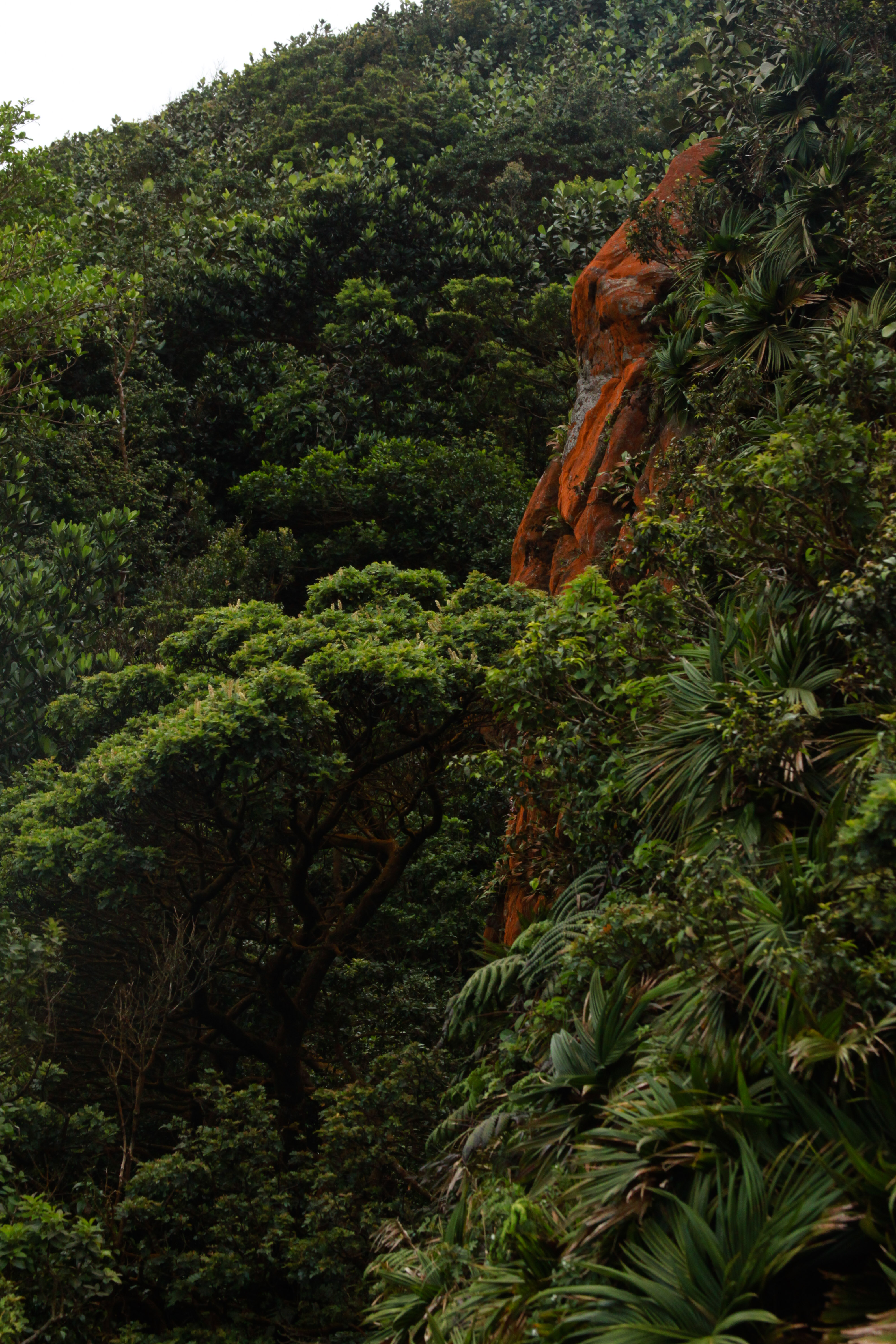 Camino a la cima del cerro Santa Ana.